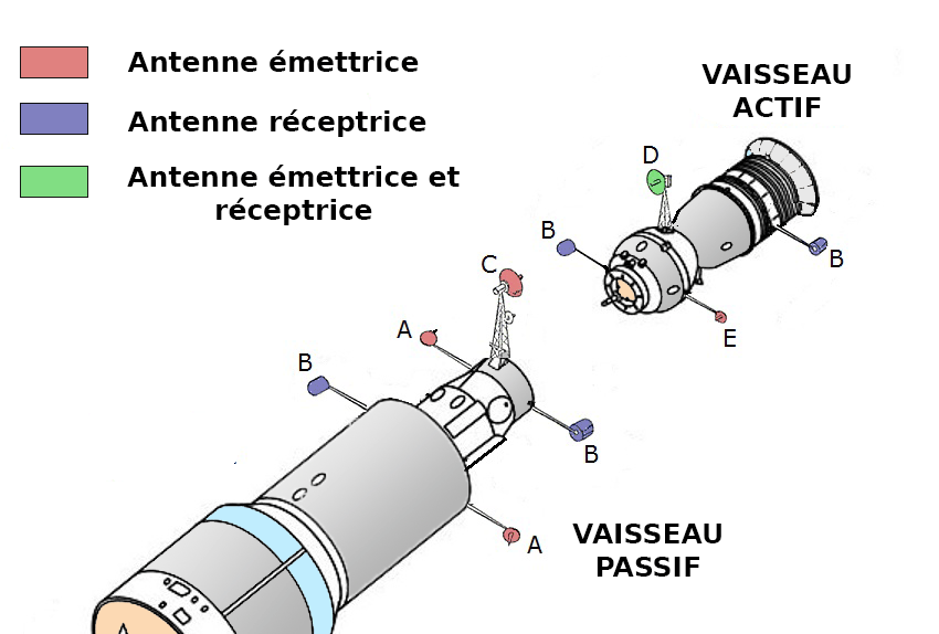 Système de rendez-vous spatial automatique soviétique Igla : les différents types d'antenne